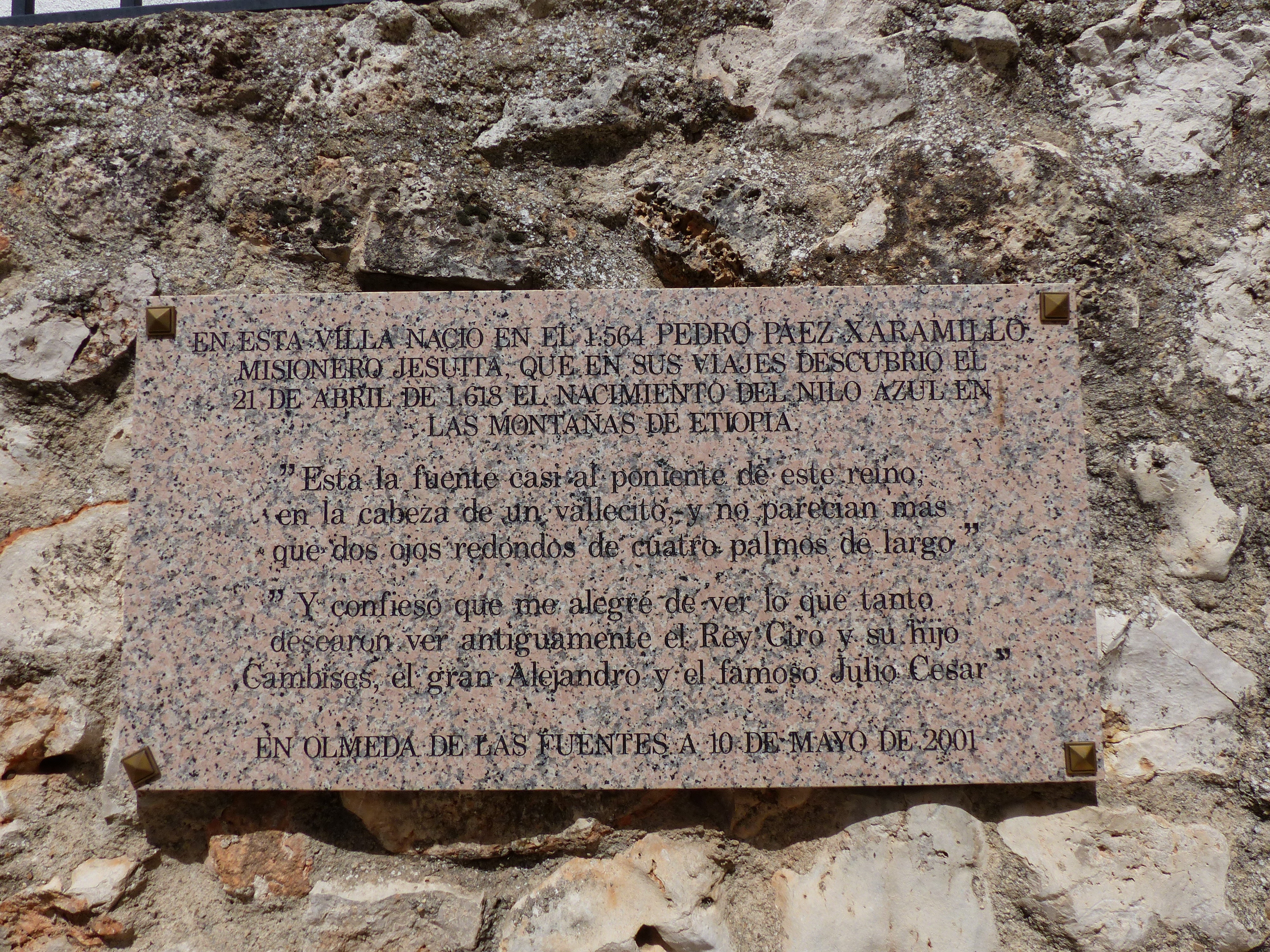 Olmeda de las Fuentes